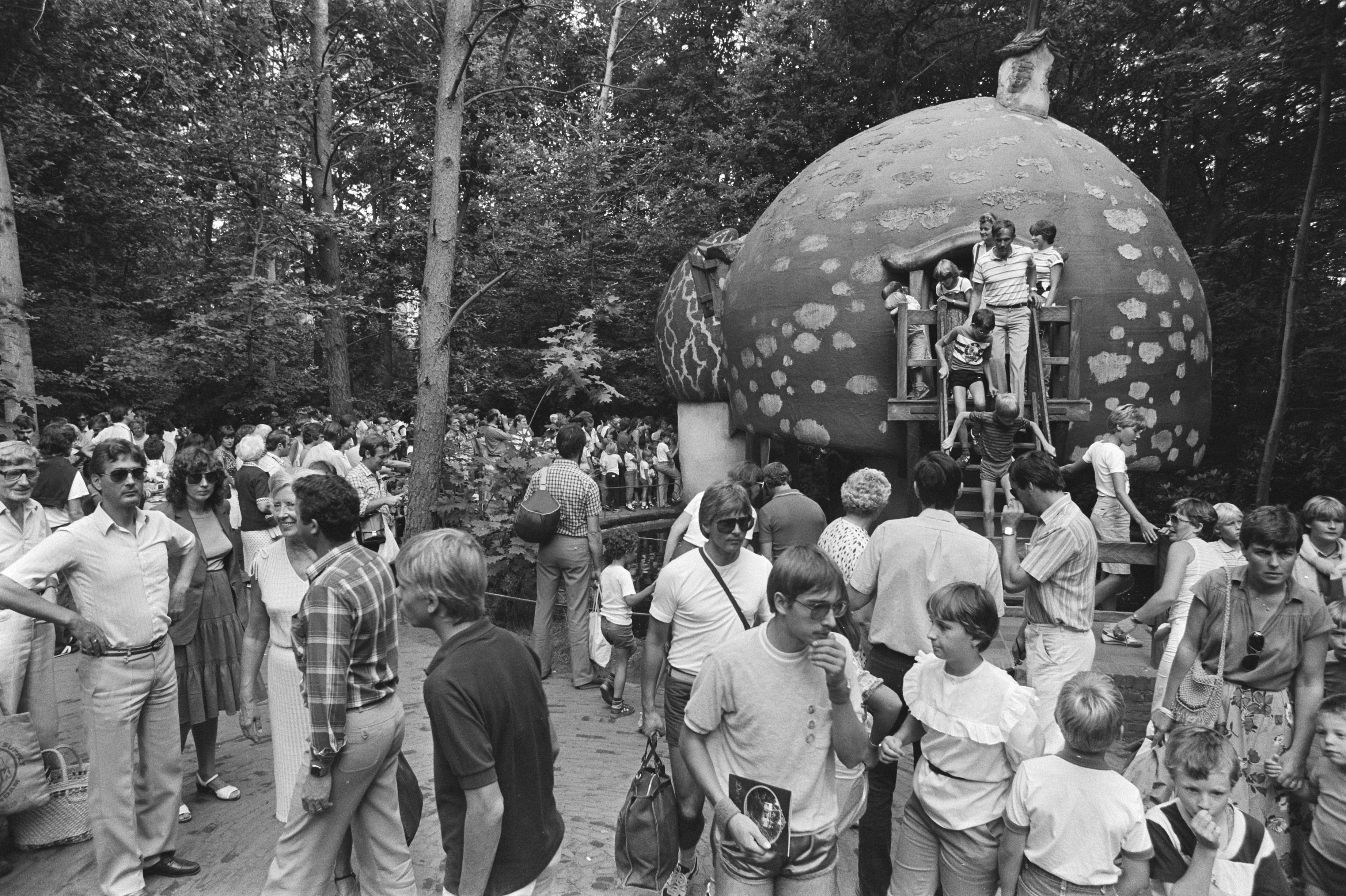 Collectie / Archief : Fotocollectie Anefo Reportage / Serie : [ onbekend ] Beschrijving : Pretpark de Efteling; drukte bij paddestoelen in het sprookjespark Datum : 12 augustus 1982 Locatie : Kaatsheuvel Trefwoorden : pretparken, sprookjesparken Persoonsnaam : Efteling Fotograaf : Croes, Rob C. / Anefo Auteursrechthebbende : Nationaal Archief Materiaalsoort : Negatief (zwart/wit) Nummer archiefinventaris : bekijk toegang 2.24.01.05 Bestanddeelnummer : 932-2737